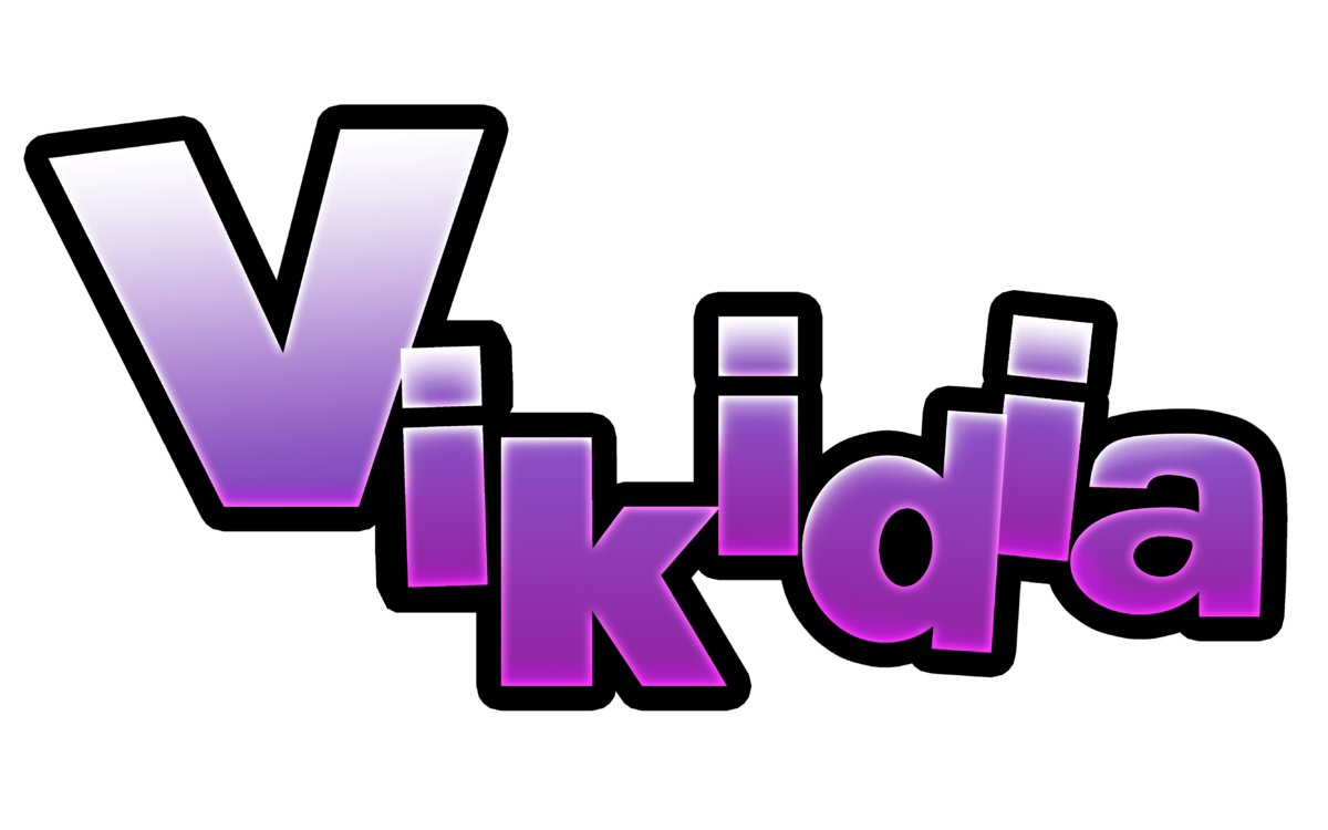 Logo de Vikidia, l'encyclopédie pour les 8-13 ans.